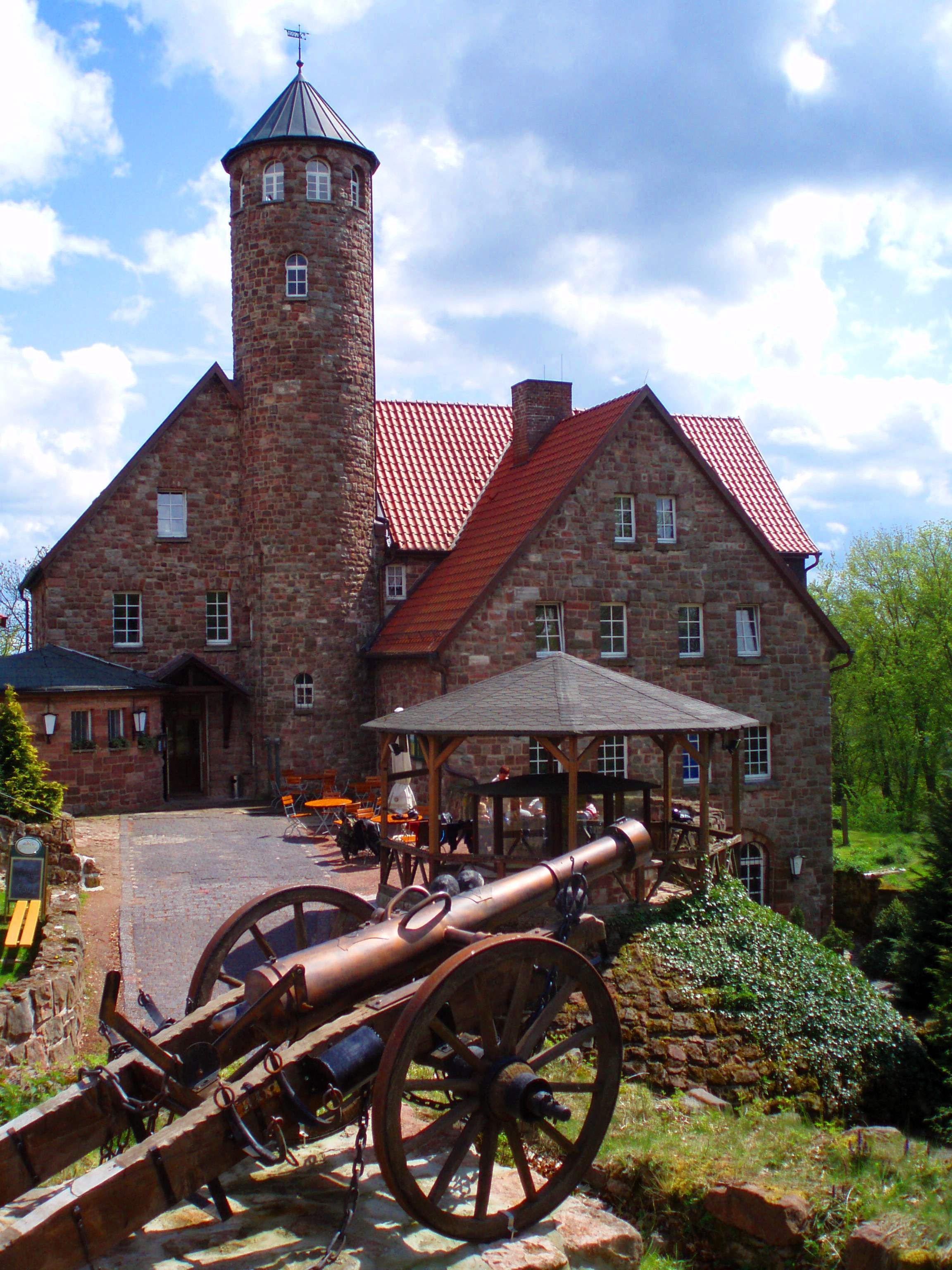 Auf der Krayenburg